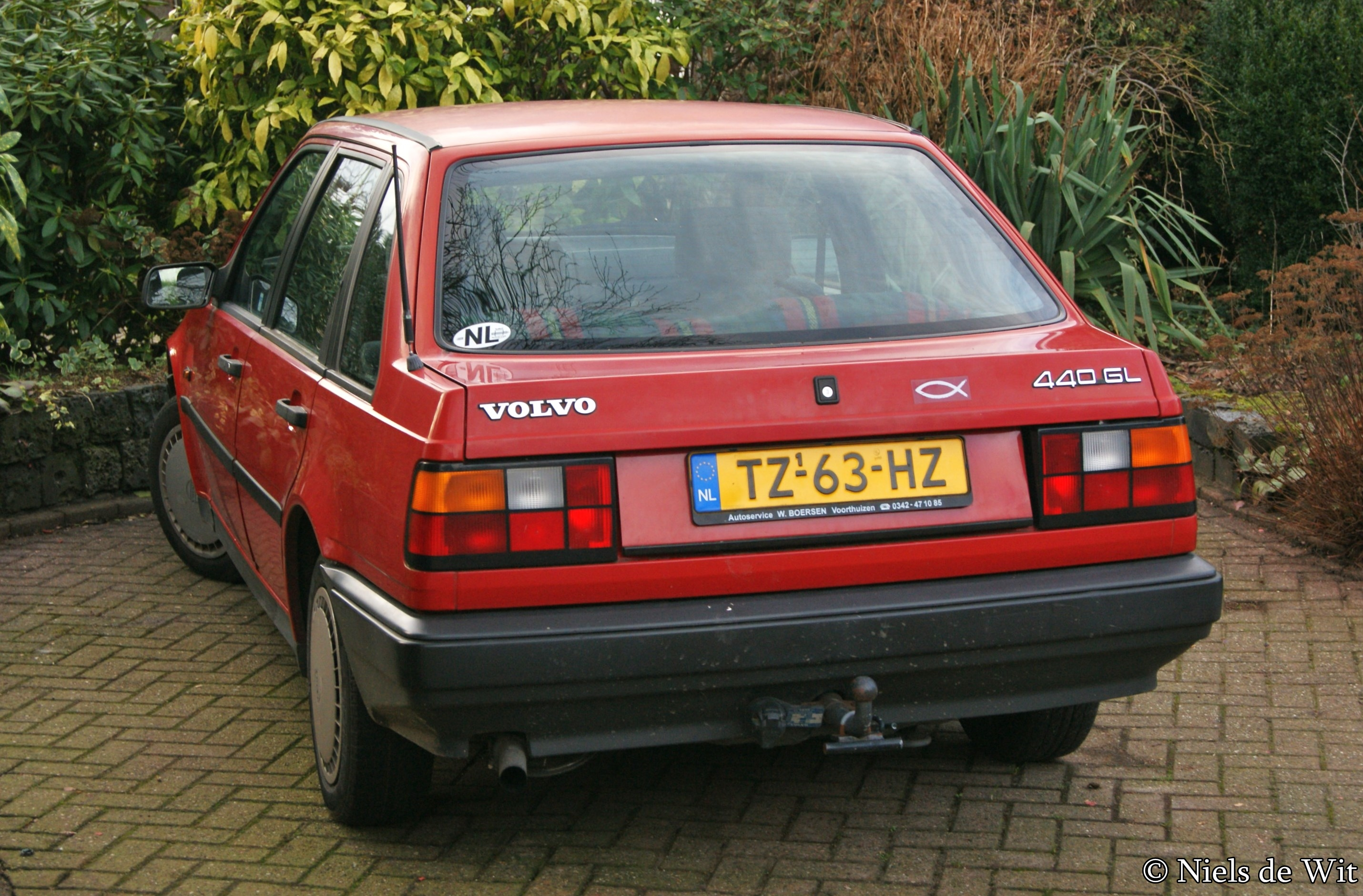 TZ-63-HZ